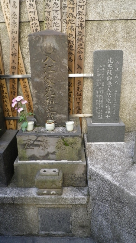 入江長八の墓